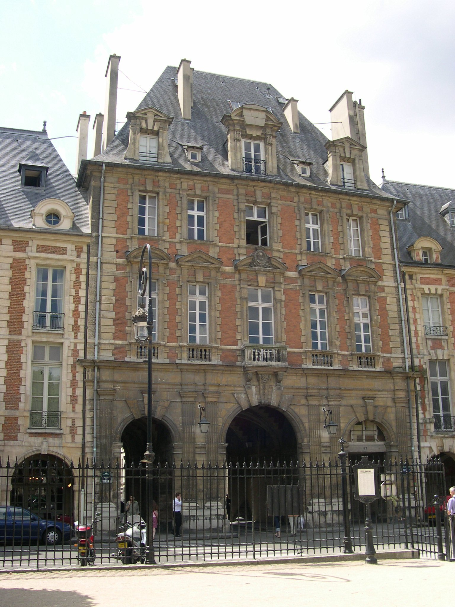 Place des Vosges, Paris, France.